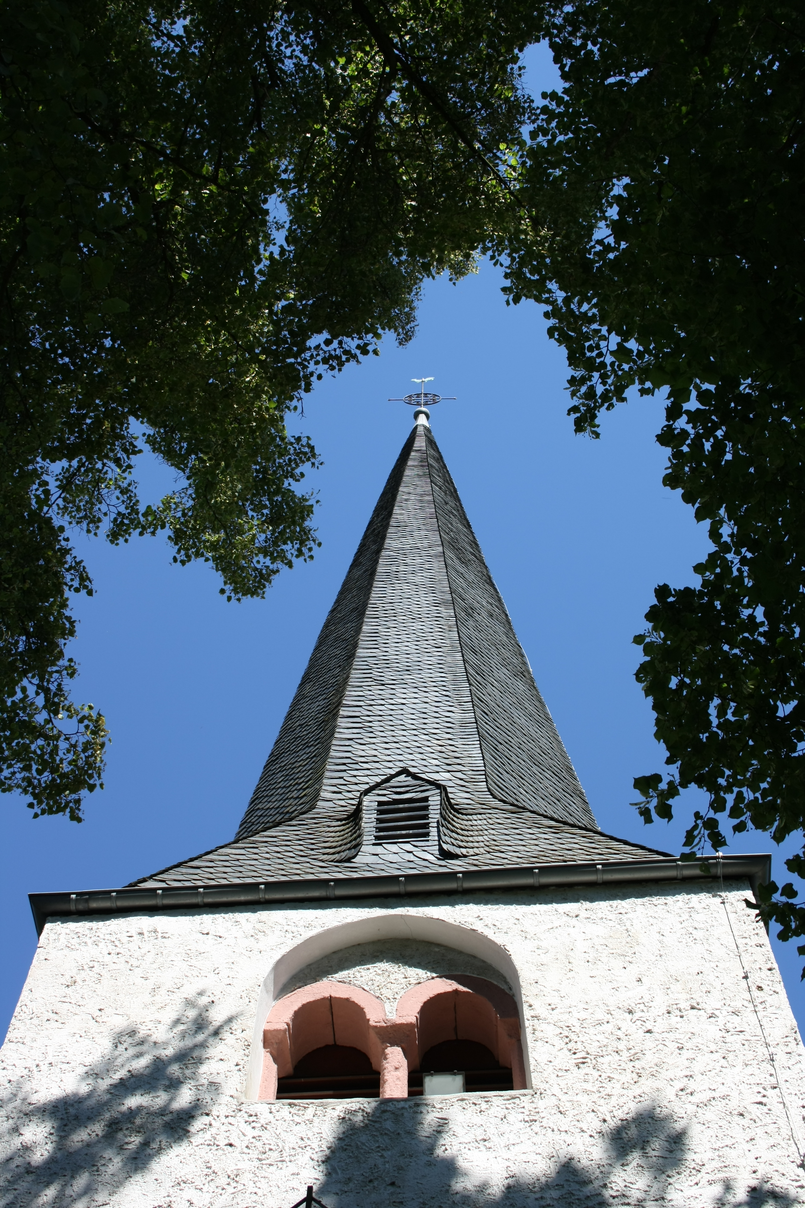 Turm der katholischen Pfarrkirche St. Wendelinus in Kirmutscheid